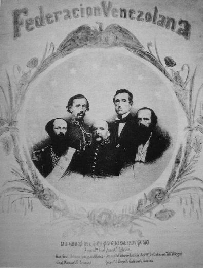 Afiche alusivo al gobierno provisional de la Federación de Venezuela, al finalizar la Guerra Federal. En el centro el Presidente de la República de Venezuela Juan Crisóstomo Falcón. A su derecha Antonio Guzmán Blanco y Manuel Ezequiel Bruzual. A su izquierda Guillermo Tell Villegas y Guillermo Iribarren